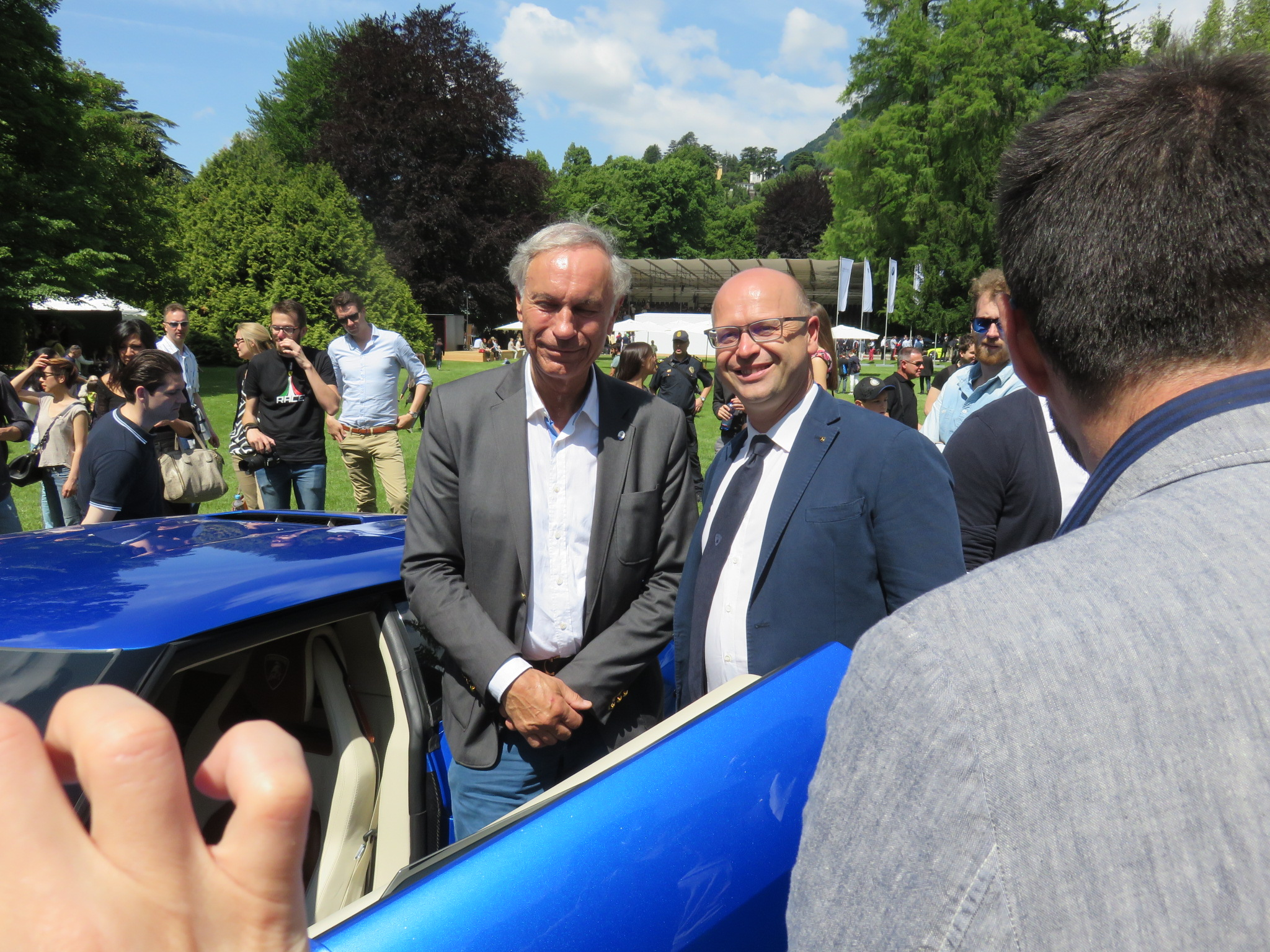 Lamborghini Asterion LPI910/4, Concours d'élégance Villa d'Este 2015, avec le designer Lomborgini du vehicule Filippo Perini à droite en veste bleue